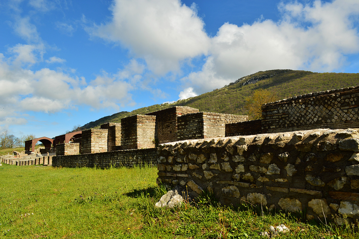 Sito Archeologico